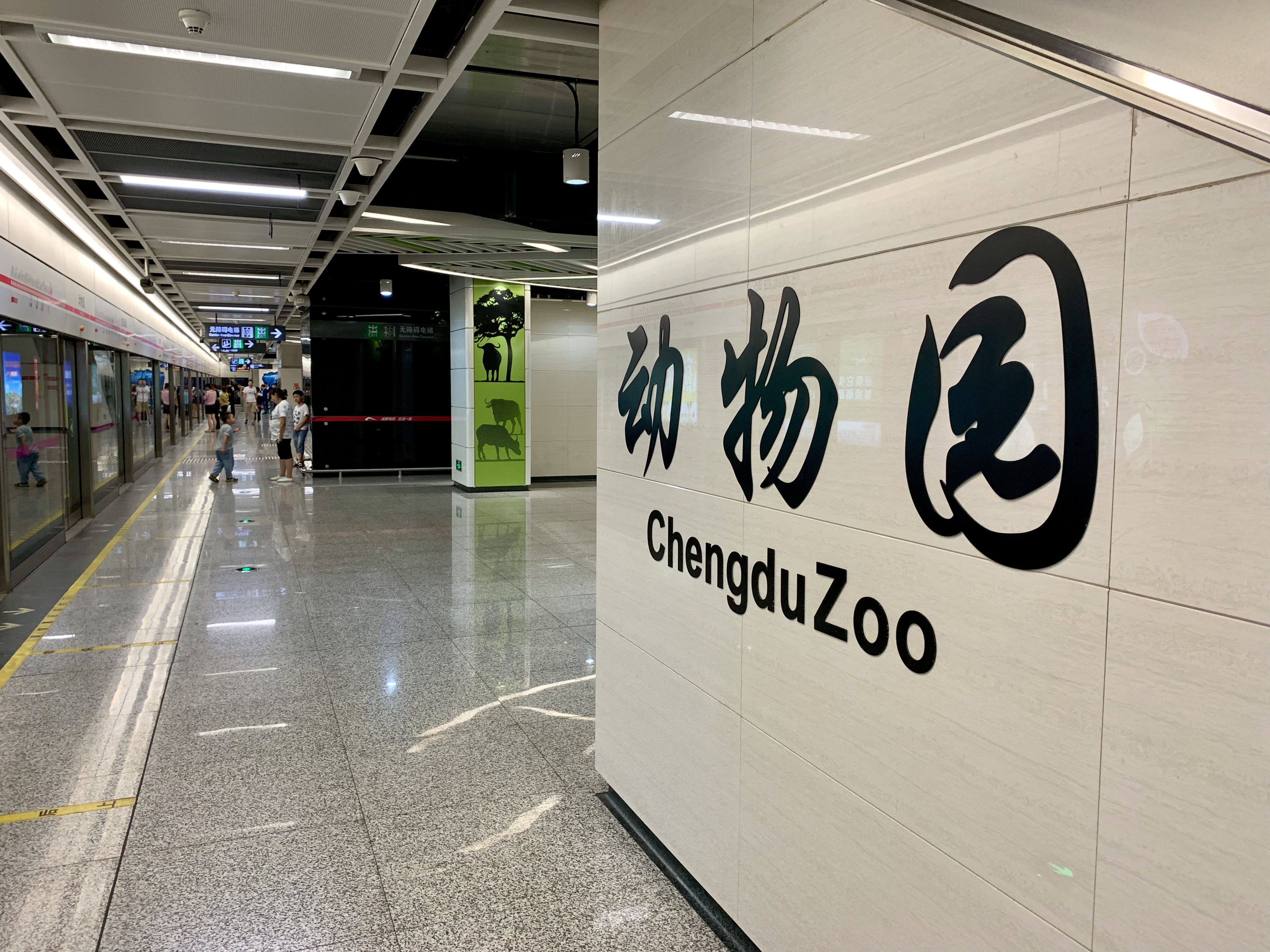 成都地铁动物园站